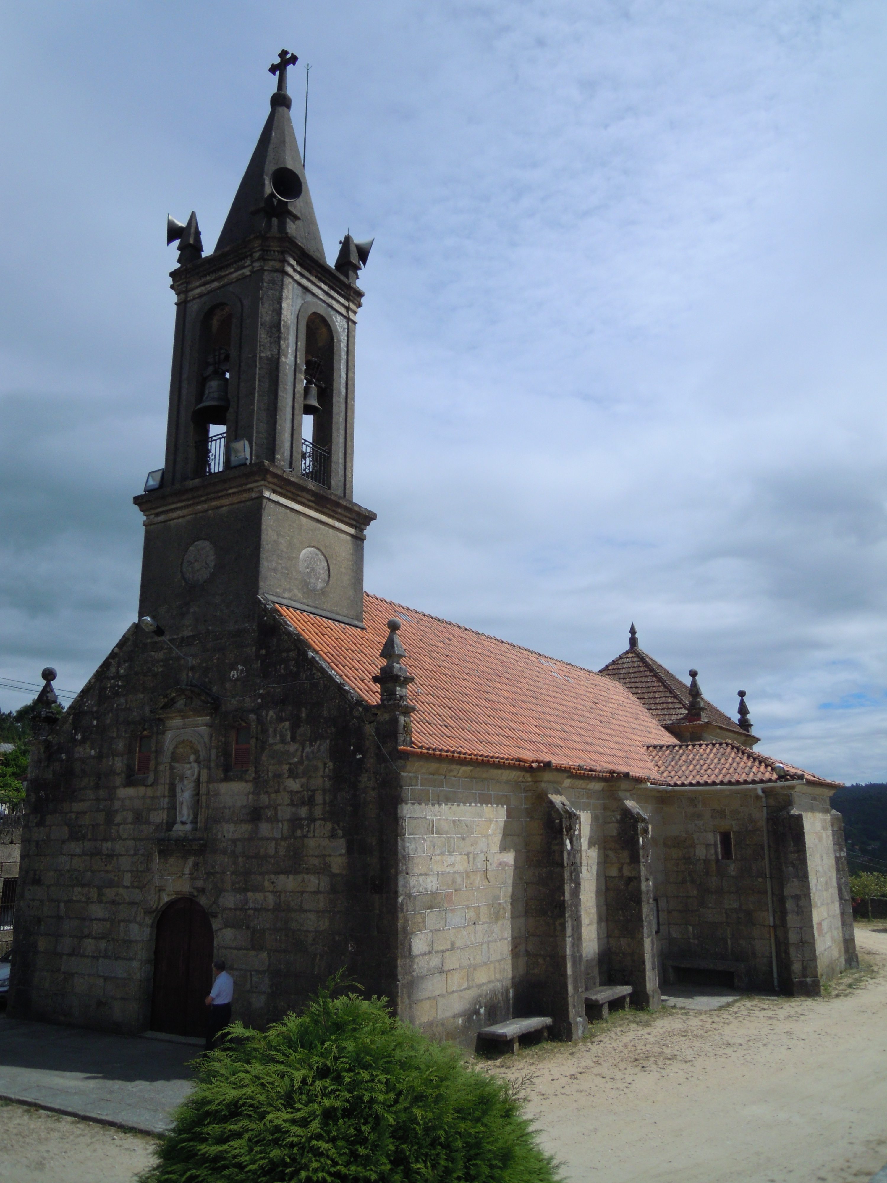 Igrexa de San Cristovo de Mourentán (Arbo)